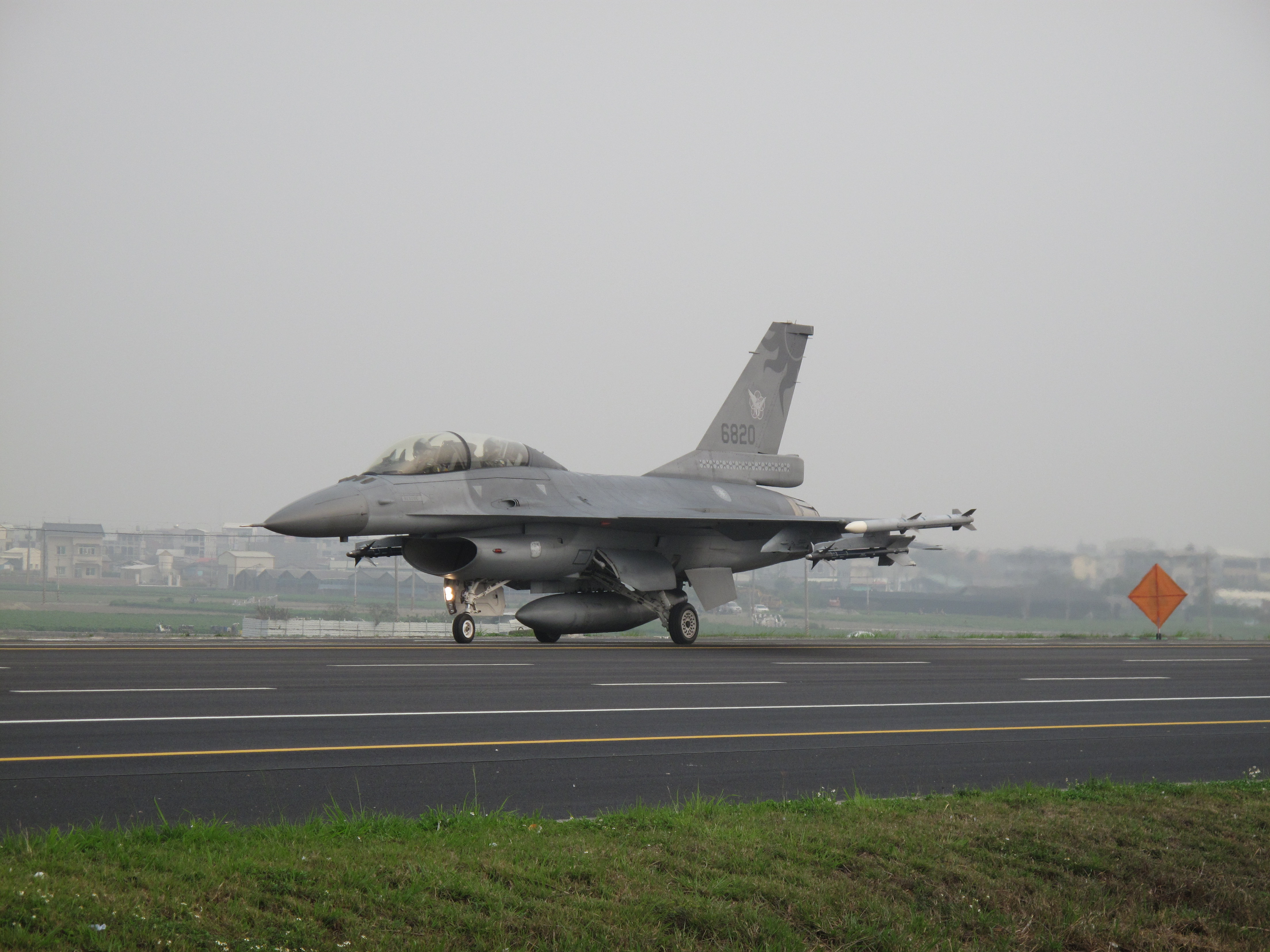 臺空軍的美制F-16戰機。攝影於2011年4月12日，漢光27號演習臺南麻豆戰備跑道軍機起降操演，401聯隊F-16B 6820降落中。